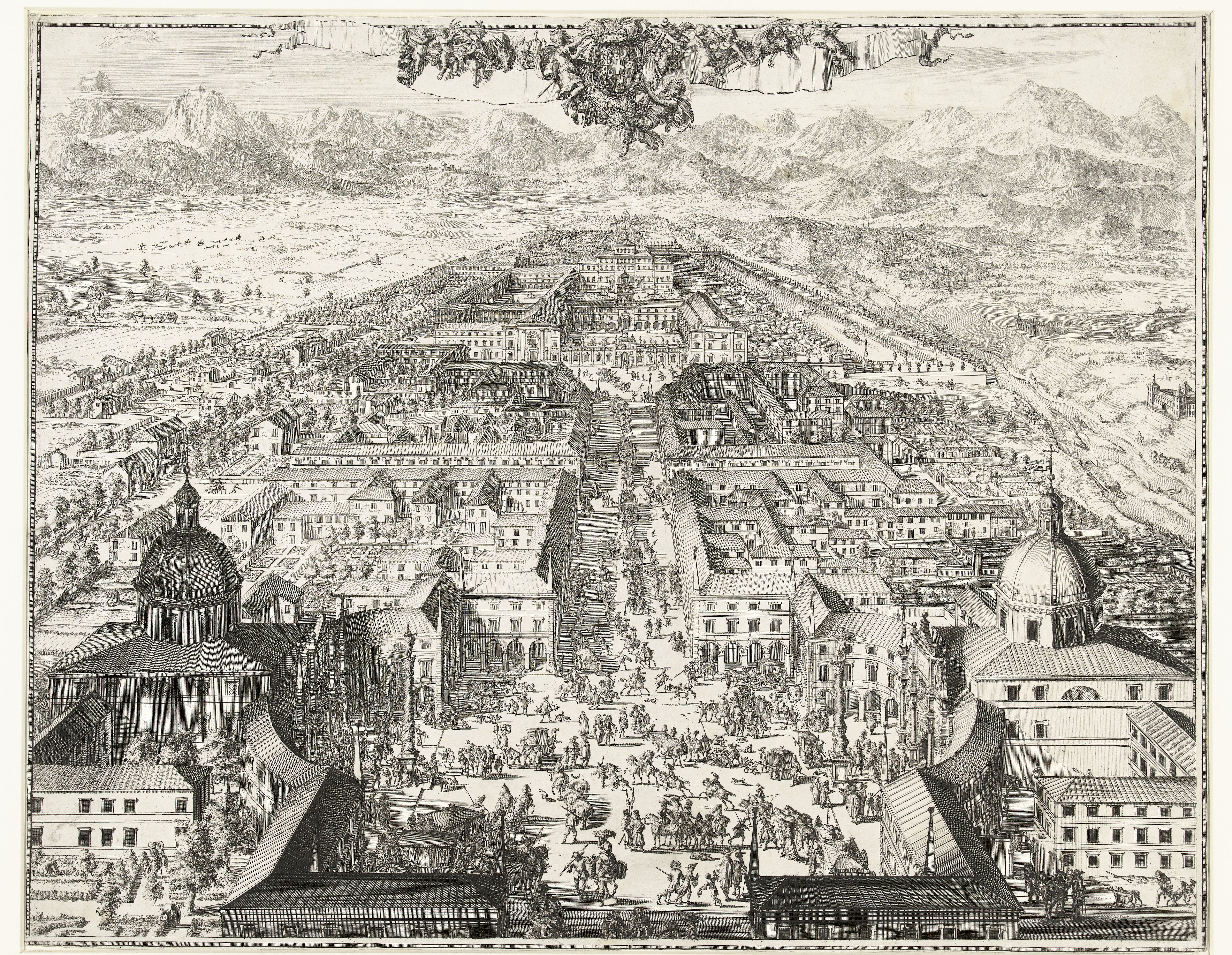 IdentificatieTitel(s): Gezicht op het koninklijk jachtpaleis in TurijnObjecttype: prent Objectnummer: RP-P-1954-408Catalogusreferentie: Hollstein Dutch 333Omschrijving: Gezicht op het koninklijk jachtpaleis in Turijn. Op de voorgrond een plein vol bedrijvigheid met aan weerszijden kerken. Van daaruit loopt een brede straat met een rij koetsen richting het koninklijk jactpaleis en de tuinen. Op de achtergrond een berglandschap. Boven de voorstelling een heraldisch wapen met aan weerszijden lege banderollen.VervaardigingVervaardiger: prentmaker: Romeyn de Hooghe (mogelijk)naar eigen ontwerp van: Romeyn de Hooghe (mogelijk)Plaats vervaardiging: NederlandDatering: 1681 - 1682Fysieke kenmerken: etsMateriaal: papier Techniek: etsenAfmetingen: blad: h 465 mm × b 588 mmToelichtingStaat vóór de letter. Illustratie in: Theatrum Statuum Regiae Celsitudinis Sabaudiae Ducis, Amsterdam (erven Joan Blaeu) 1682.OnderwerpWat: city-view in general; 'veduta'mountainspalacesquare, place, circus, etc.Waar: TurijnVerwerving en rechtenCredit line: Aankoop uit het F.G. Waller-FondsVerwerving: aankoop 1954Copyright: Publiek domein